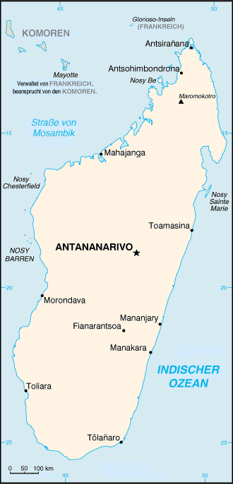 Karte Madagaskars